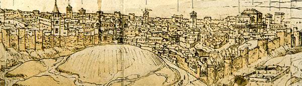 Vista de Madrid: dibujo preparatorio (1562). Detalle de la muralla cristiana